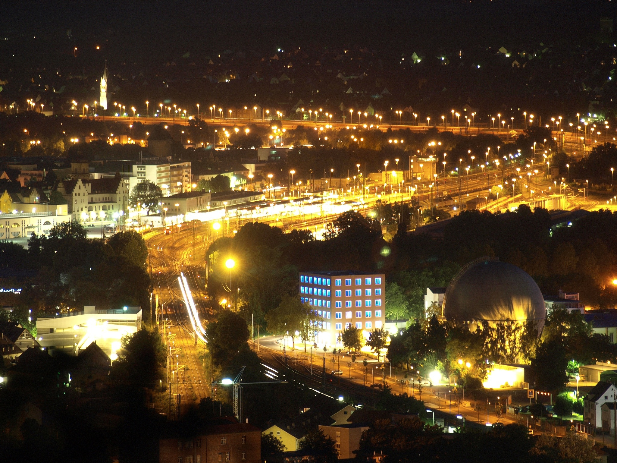 Heilbronn bei Nacht mit Bahnlinie und Bahnhof